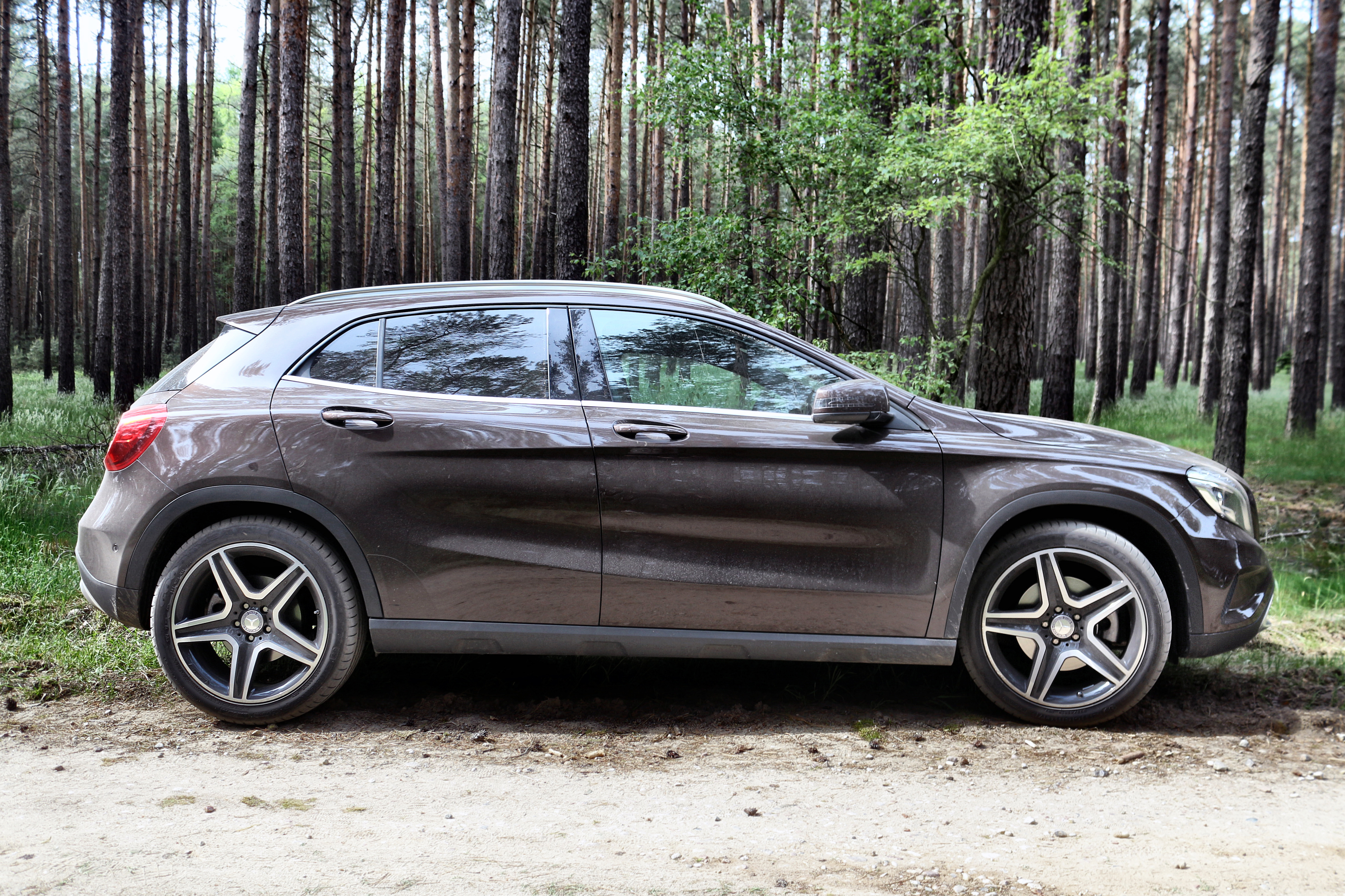 Mercedes-Benz X156 GLA 250